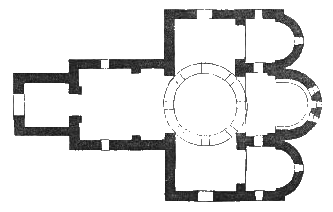 План Среднего Зеленчукского храма.